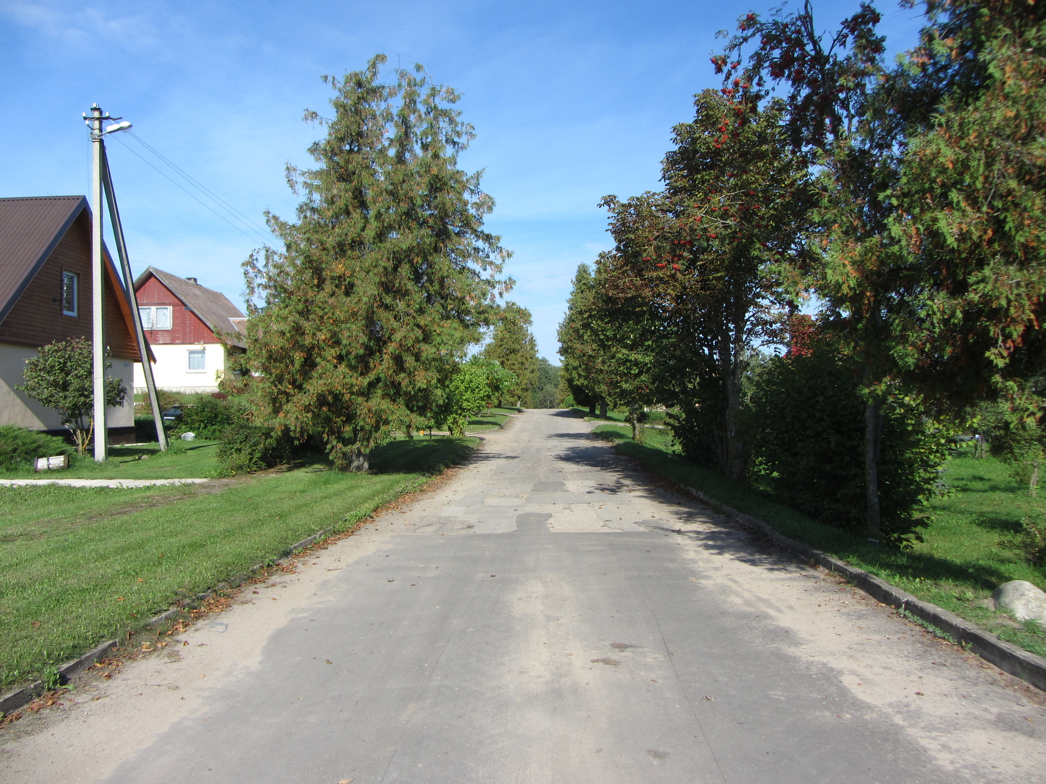 Kazitiškis, Lithuania